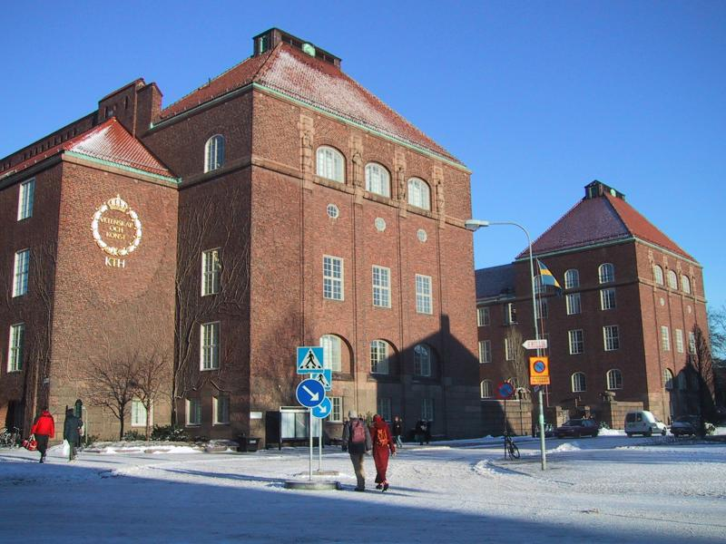 KTH 2002-01-14 / hemgjord / GNU Bild:Kth.jpgsv:en:Image:Kth.jpg